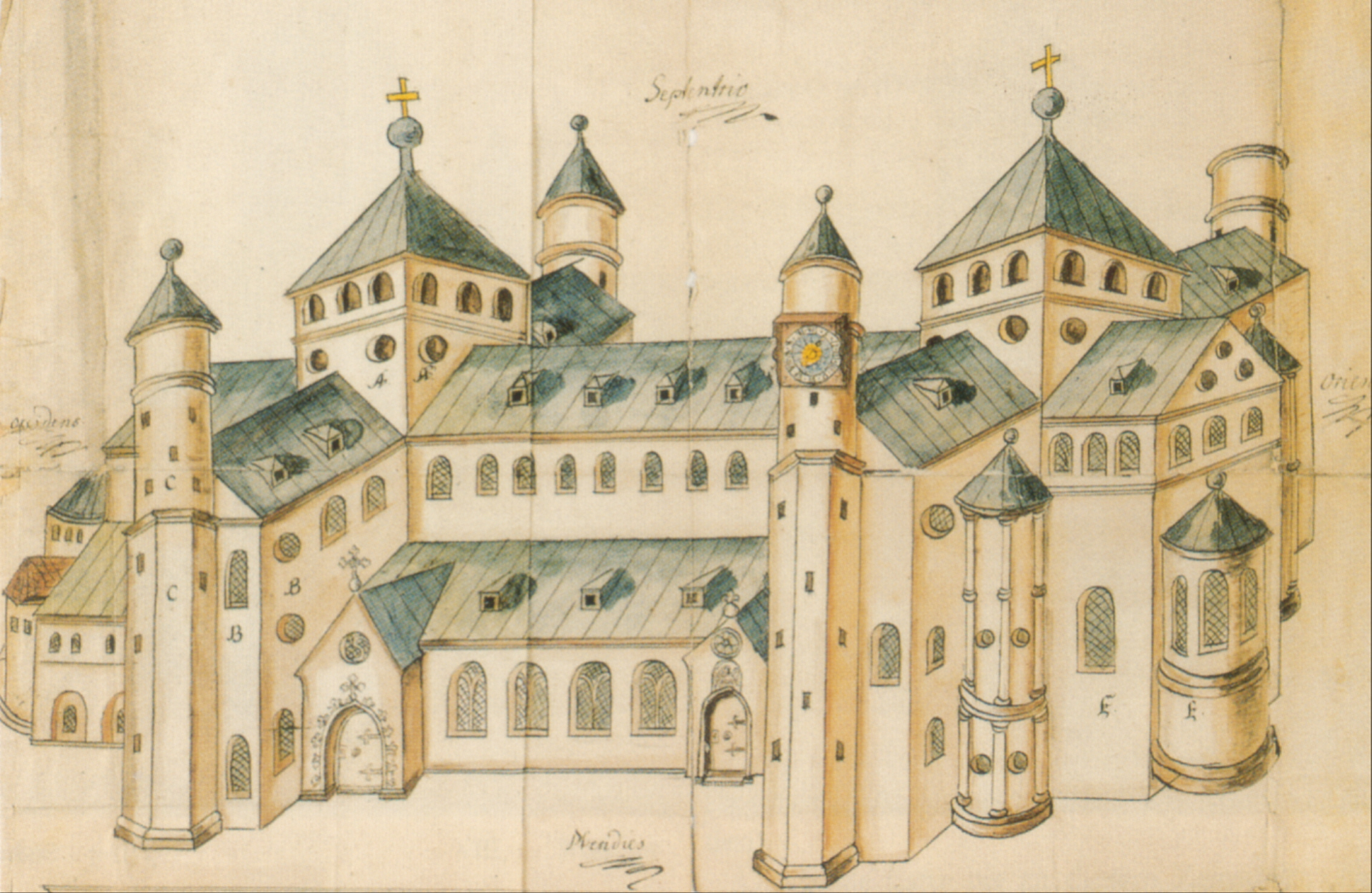 Klosterkirche St. Michael, Hildesheim Kolorierte Federzeichnung auf Karton, 1662